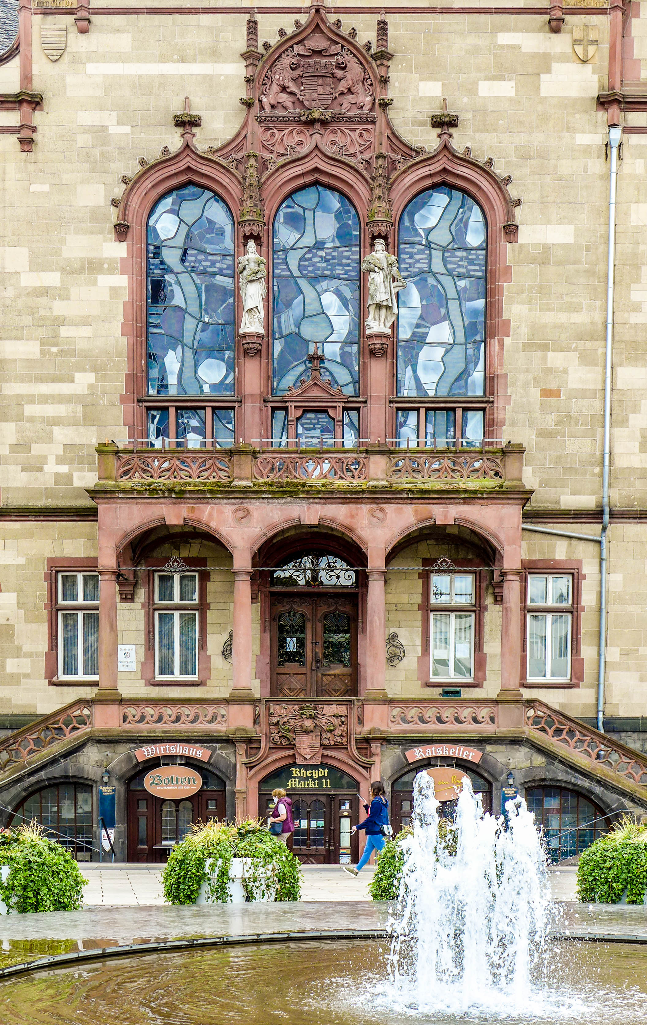 Rathaus Rehydt